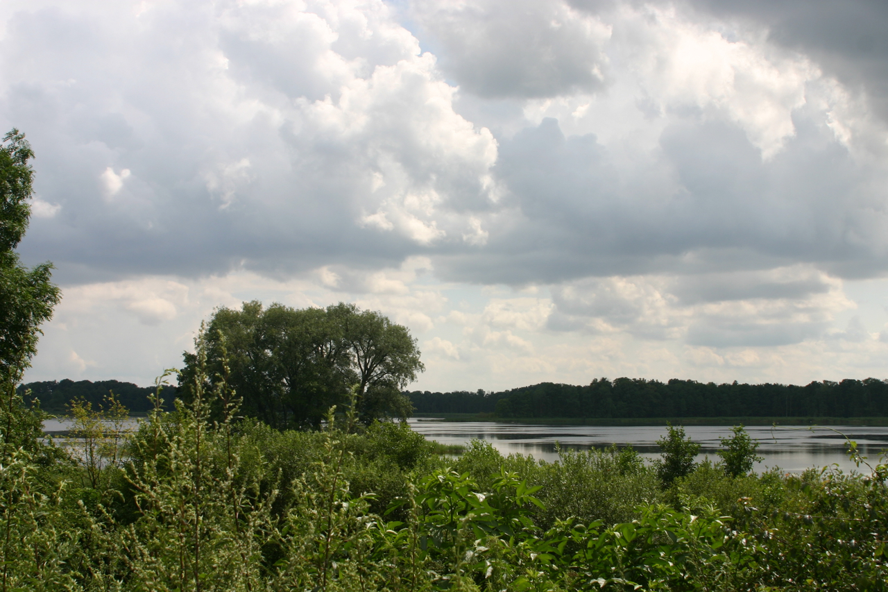 Jezioro Arklickie, Polska, powiat kętrzyński.